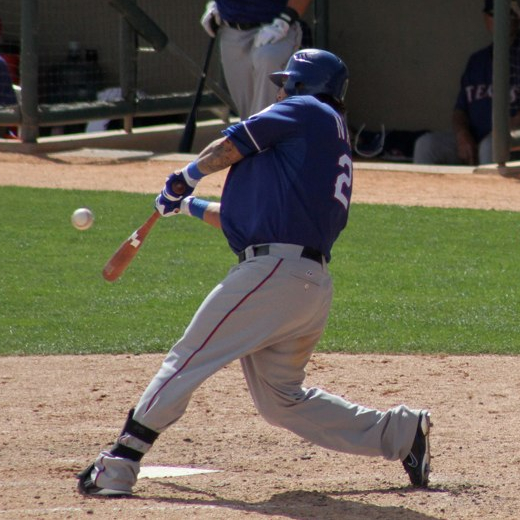 Mike Napoli